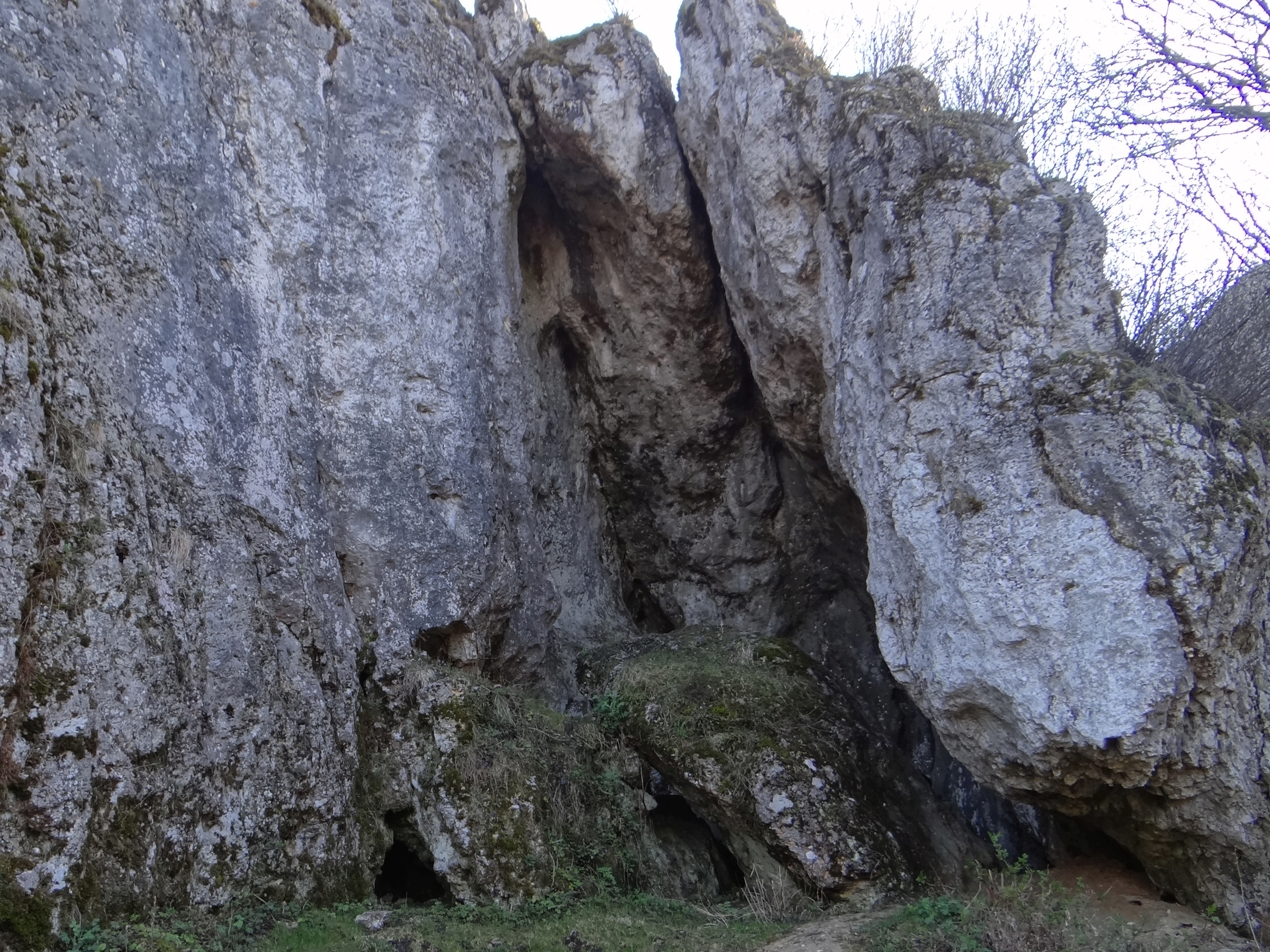 Schronisko Wysokie w Żytniej Skale